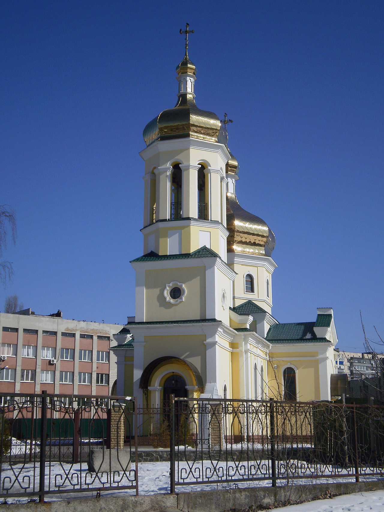 парк Победы